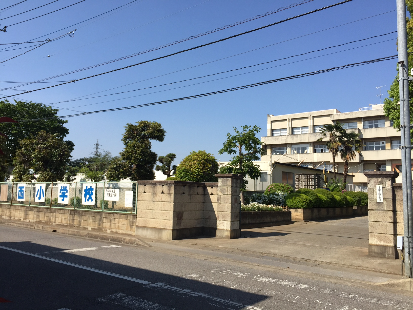 上尾市立西小学校(2017年)